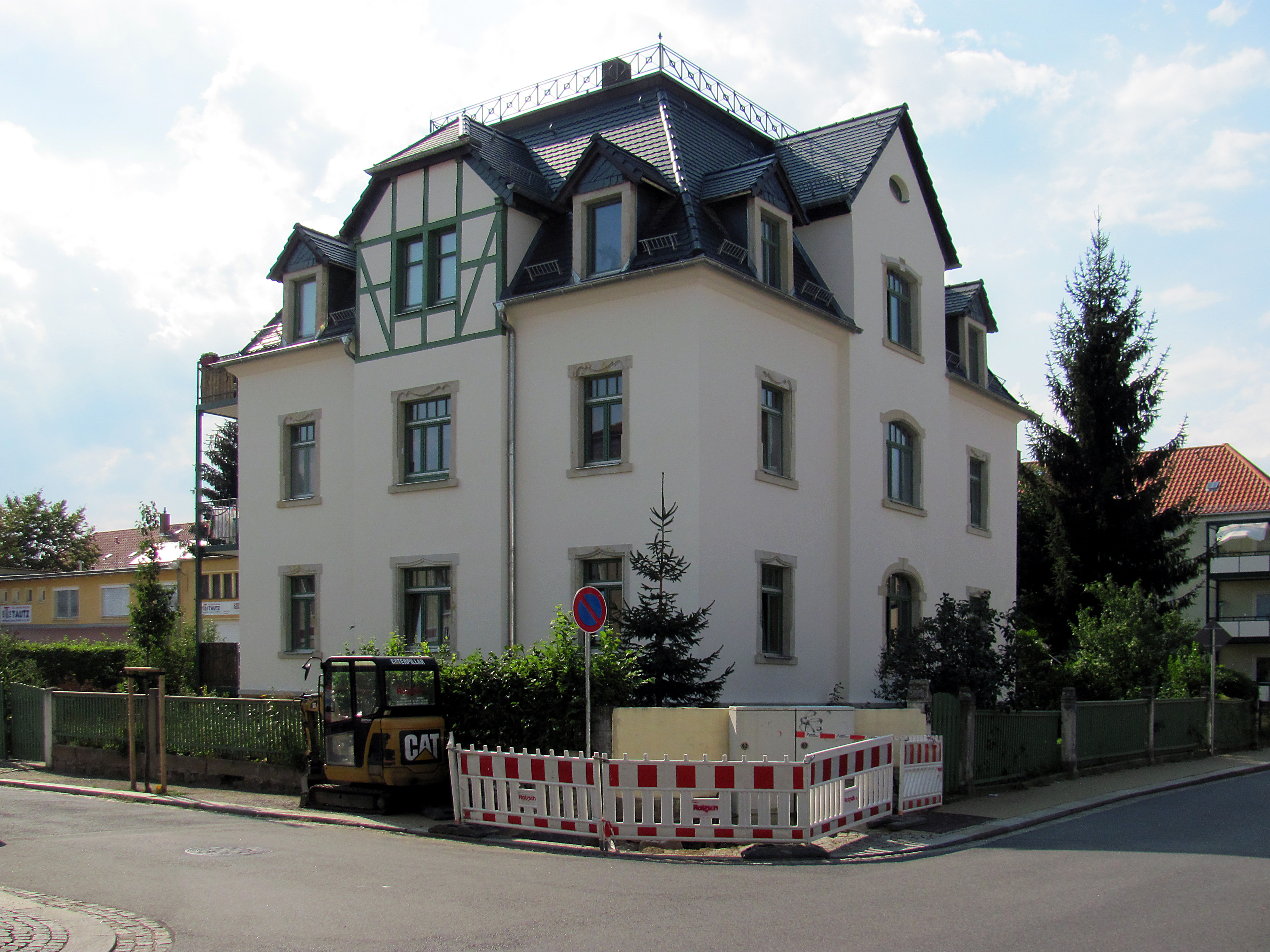 Radebeul (Gemarkung), Mietshaus Gartenstraße 61